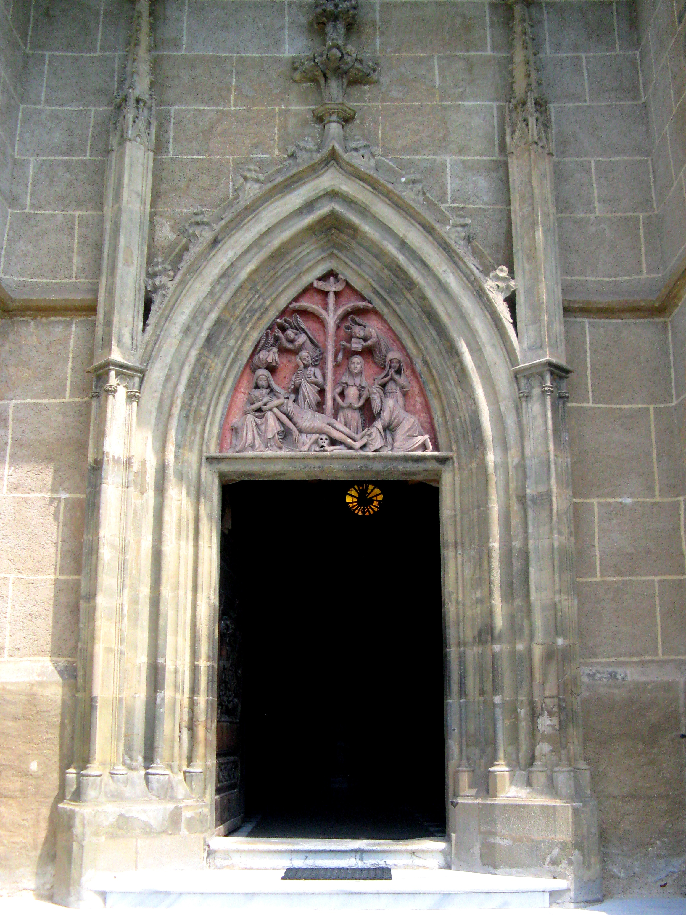 Maria Straßengel, Süd-Portal